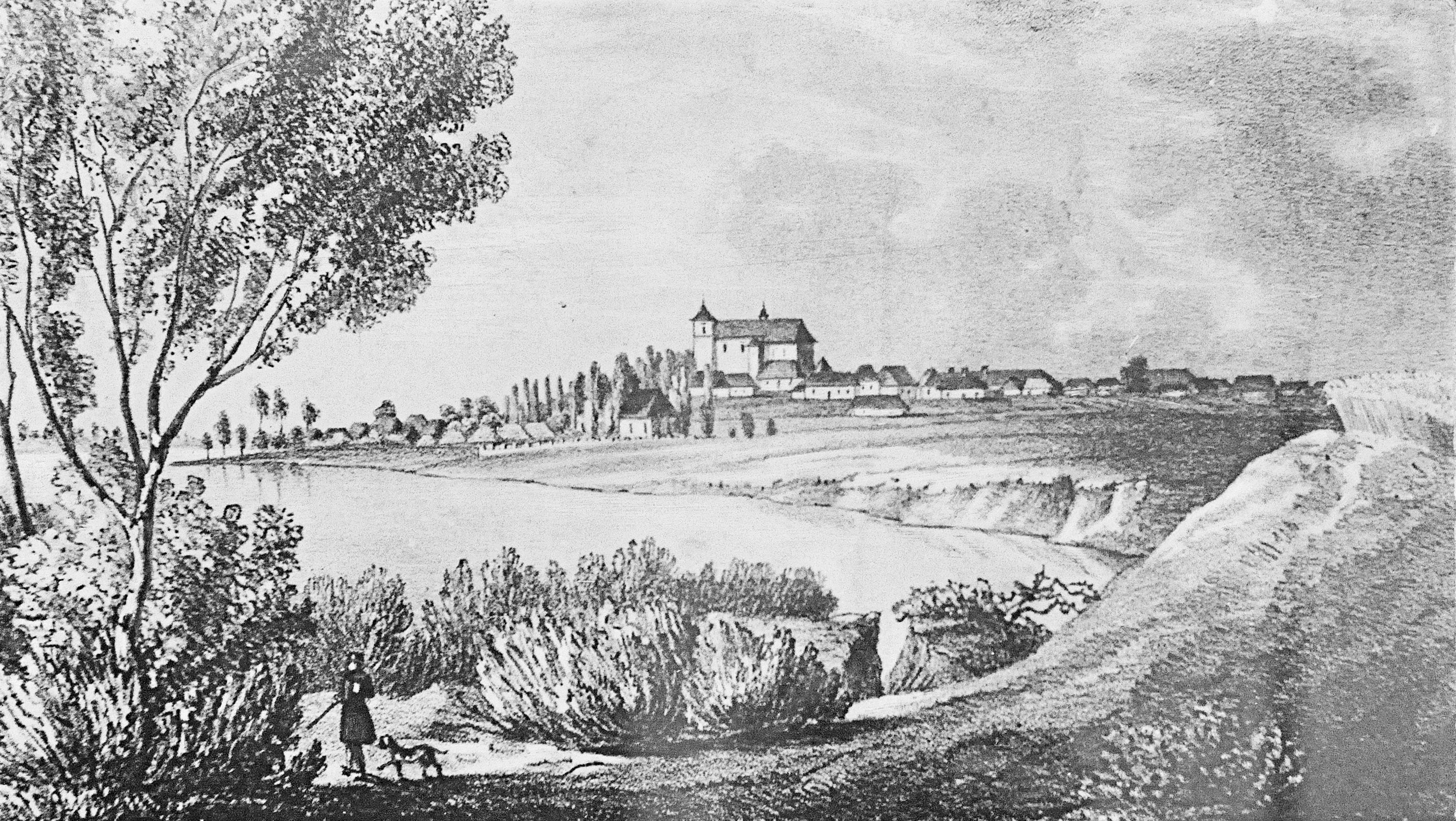 Widok Mielca od strony Wisłoki z 1847 r. autorstwa Macieja Bogusza Stęczyńskiego. Na rysunku widać znajdujący się tuż nad Wisłoką cmentarz z kaplicą cmentarną (obecnie kościół św. Marka przy ulicy Rzecznej) oraz kościół św. Mateusza (najwyższy budynek na rysunku).